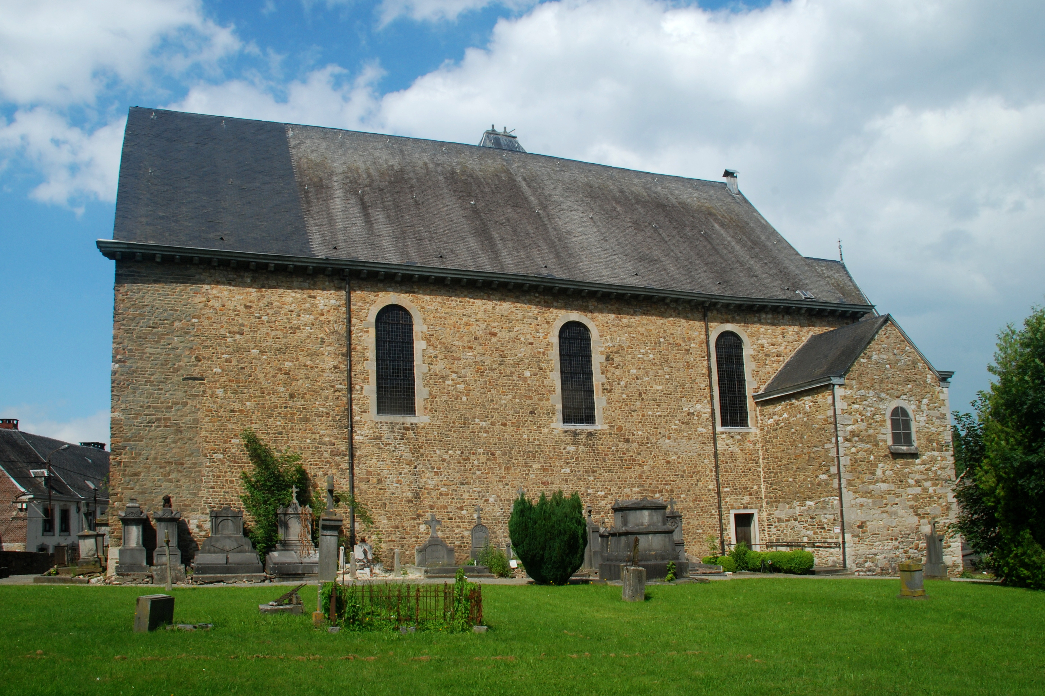 Belgique - Wallonie - Église Saints-Hermès-et-Alexandre de Theux